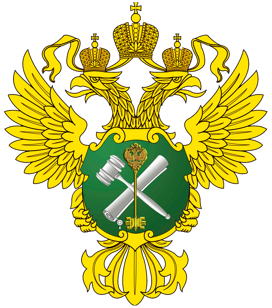 Геральдический знак-эмблема Федерального агентства по управлению государственным имуществом